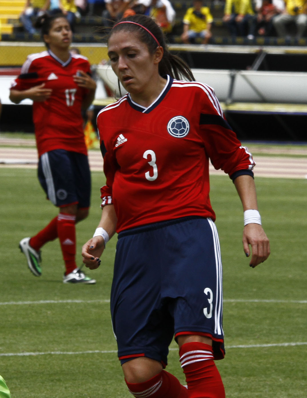 Quito, 28 sep (Andes).- La selección brasileña femenina de fútbol se proclamó Campeona de la Copa América de Fútbol Ecuador 2014. Foto: Micaela Ayala V./Andes